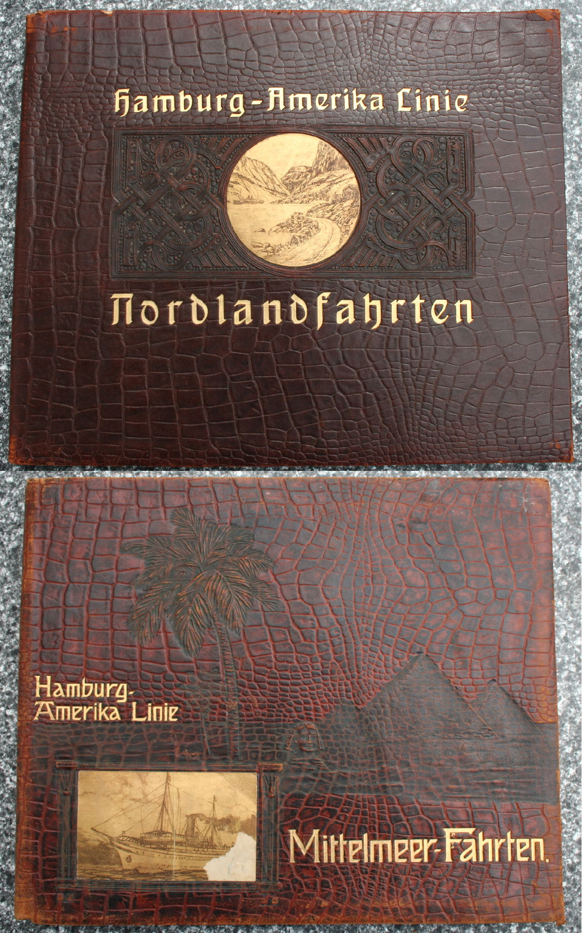 Kataloge der Hamburg Amerika Linie